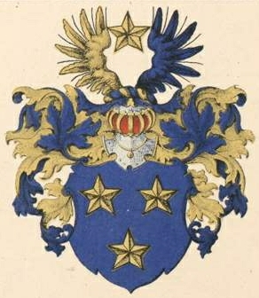 Funckeni suguvõsa aadlivapp